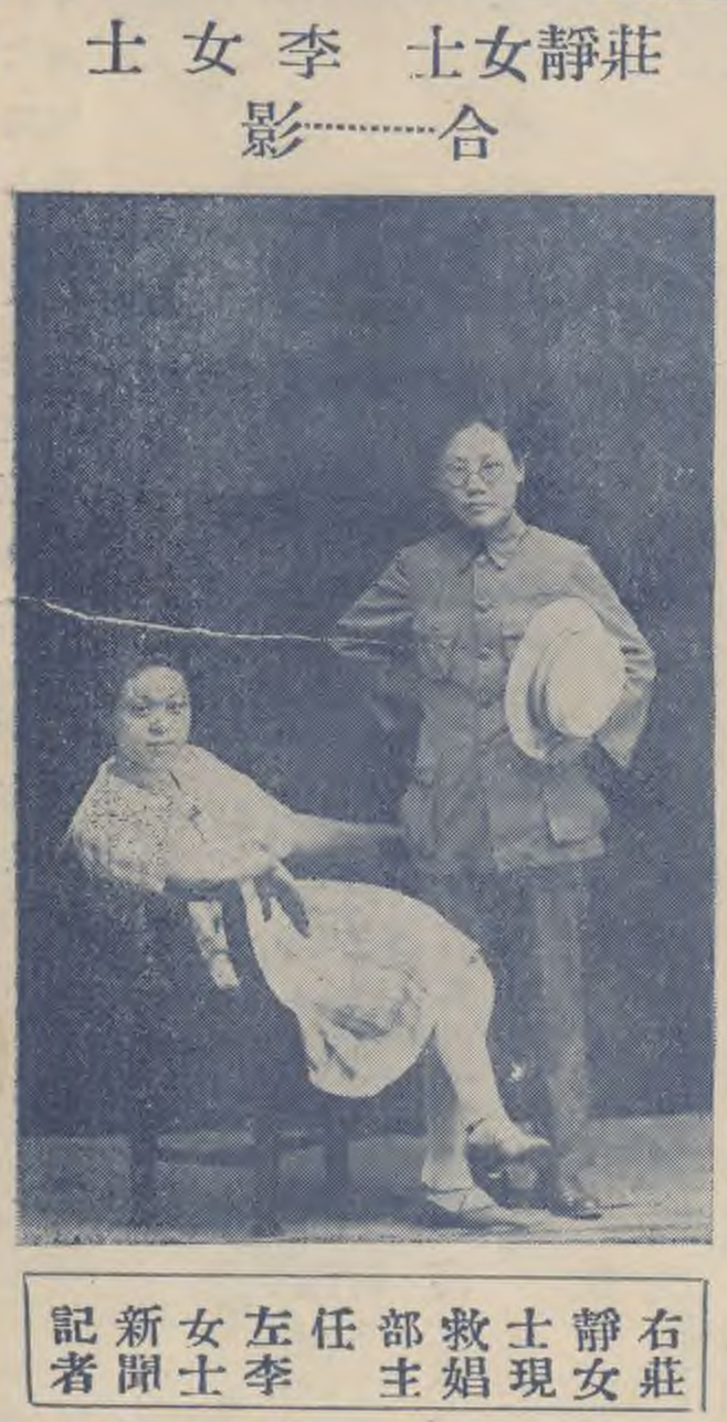 中文（台灣）: 莊靜女士李女士合影《新晨報副刊:日曜畫報》 1929年[ 第36期 ，2頁]